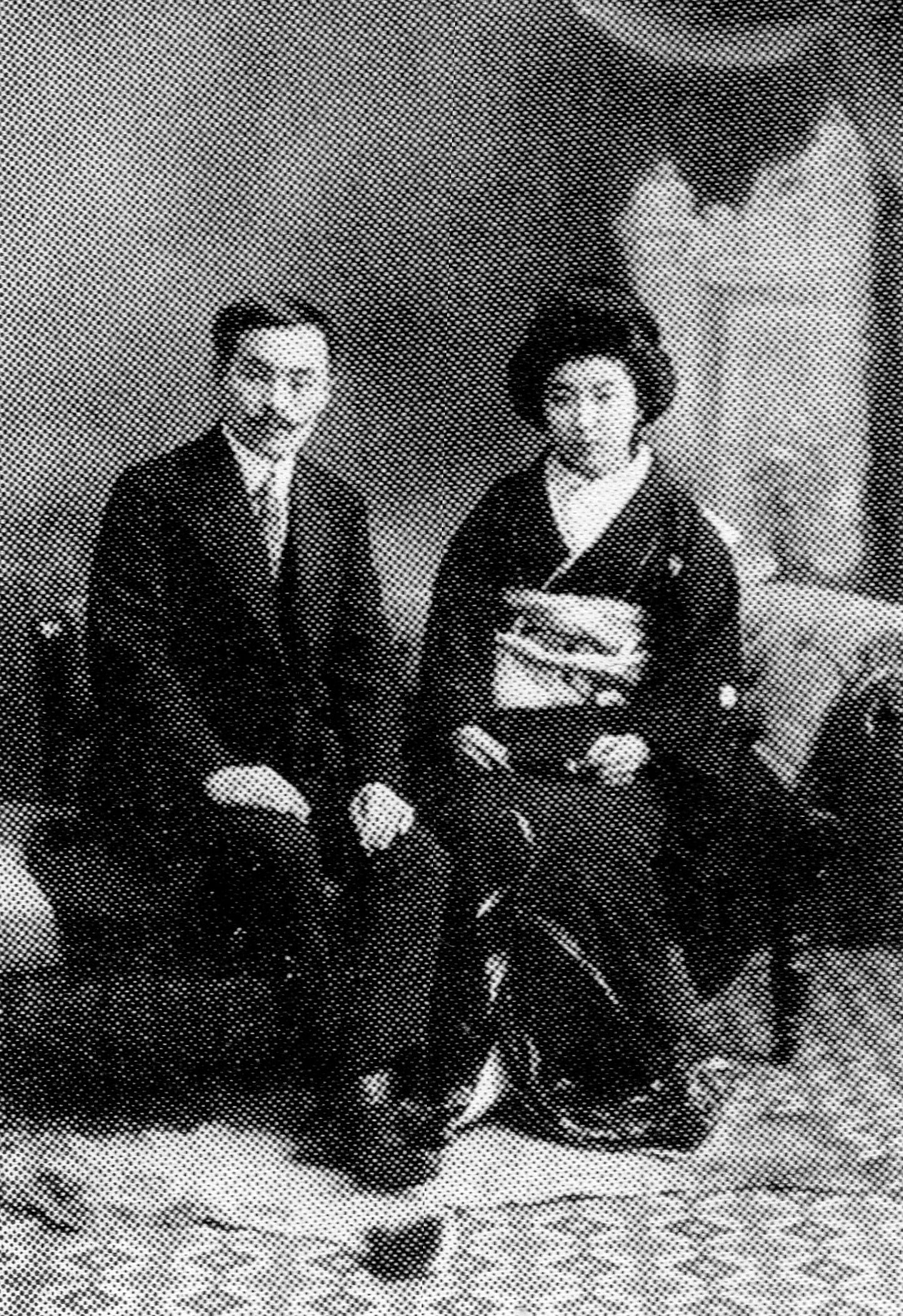 秋山徳蔵と妻俊子、大正2年（1913年）